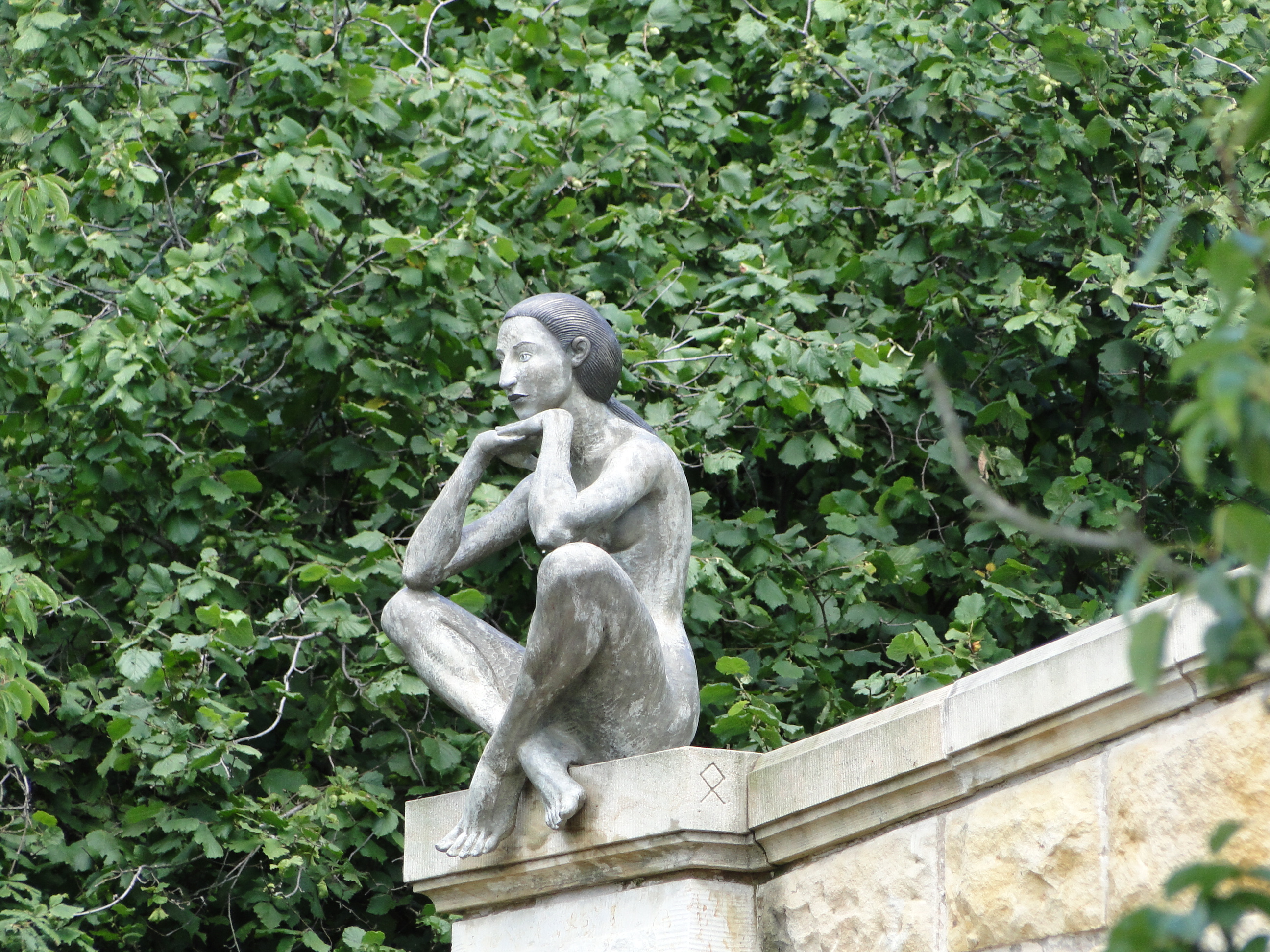 Skulptur von Malgorzata Chodakowska am Bergweg in Dresden, Weingut Zimmerling